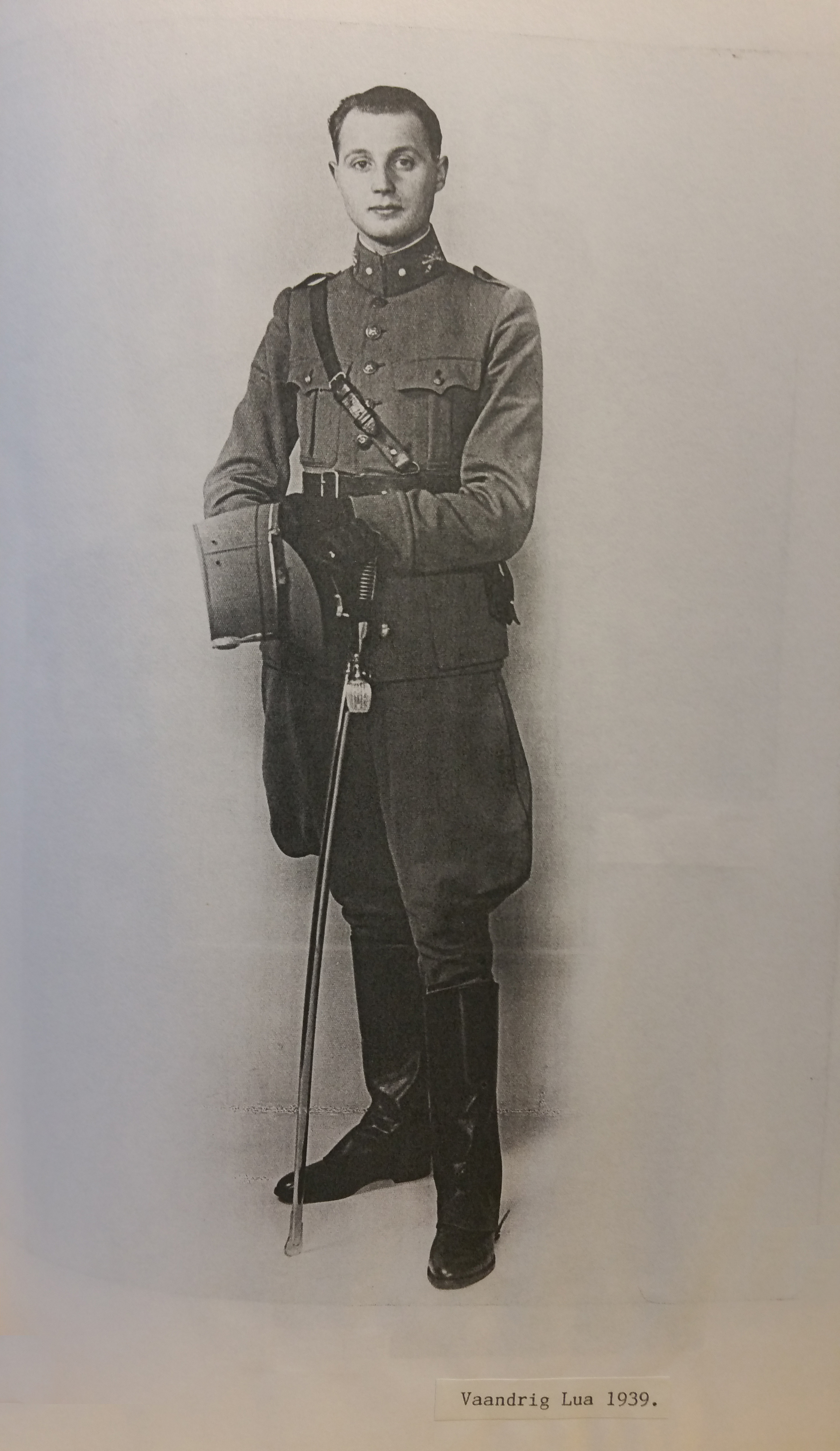 Frans J.H. van Eijk. Vaandrig bij het 18e Batterij luchtdoelartillerie te IJmuiden 1939-1940. Tekst onder de foto:Vaandrig Lua (Luchtafweer). R.A.F. Piloot en oorlogsfilmer en fotograaf van het 322 squadron tijdens de 2e wereldoorlog 1940-1945